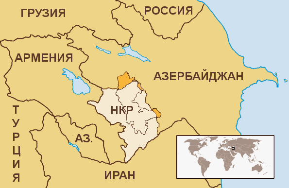 Местоположение Нагорно-Карабахской Республики.